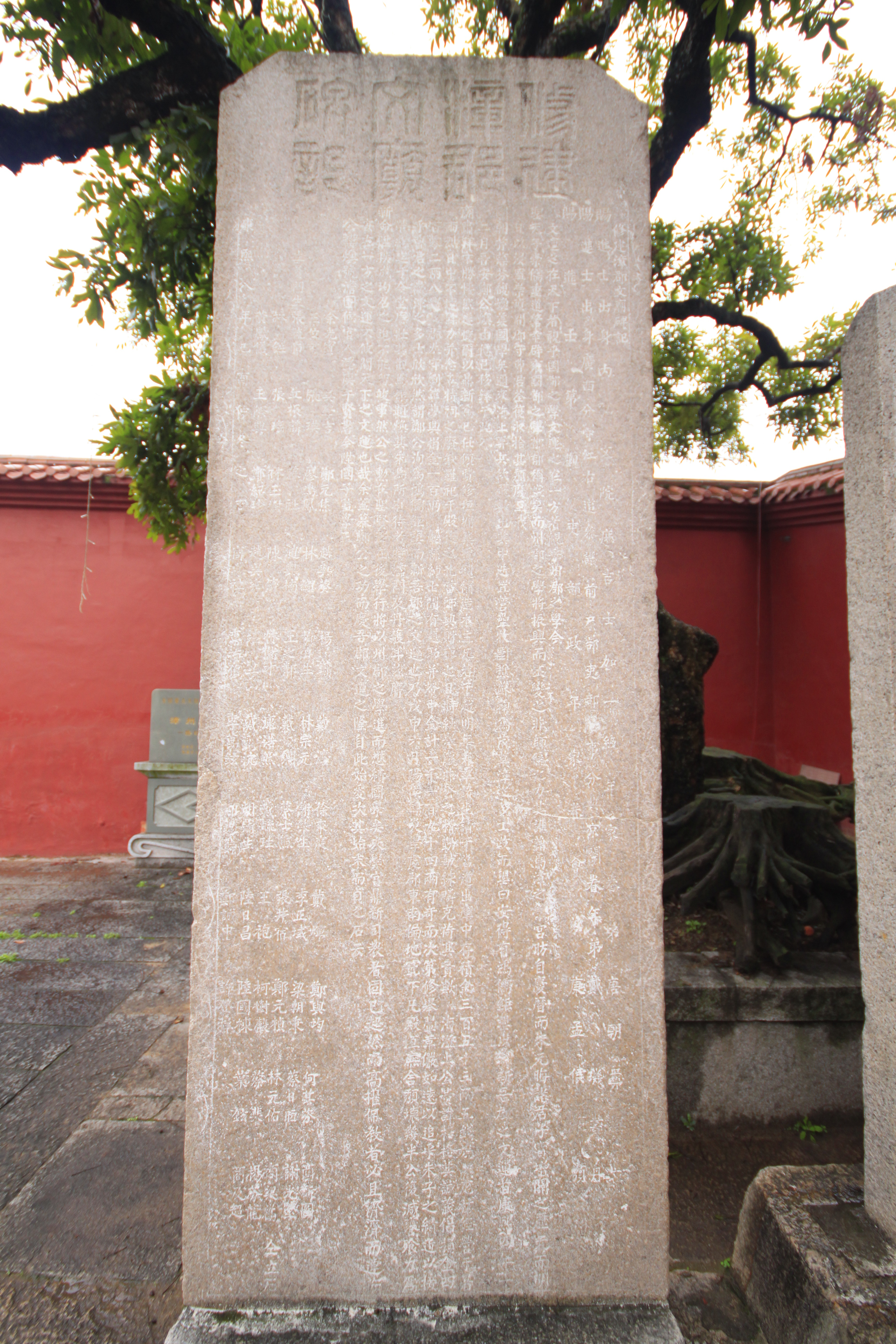 漳州府文庙，《修建漳郡文廟碑記》，唐朝彝撰文，戴璣書丹，康孟侯篆額。